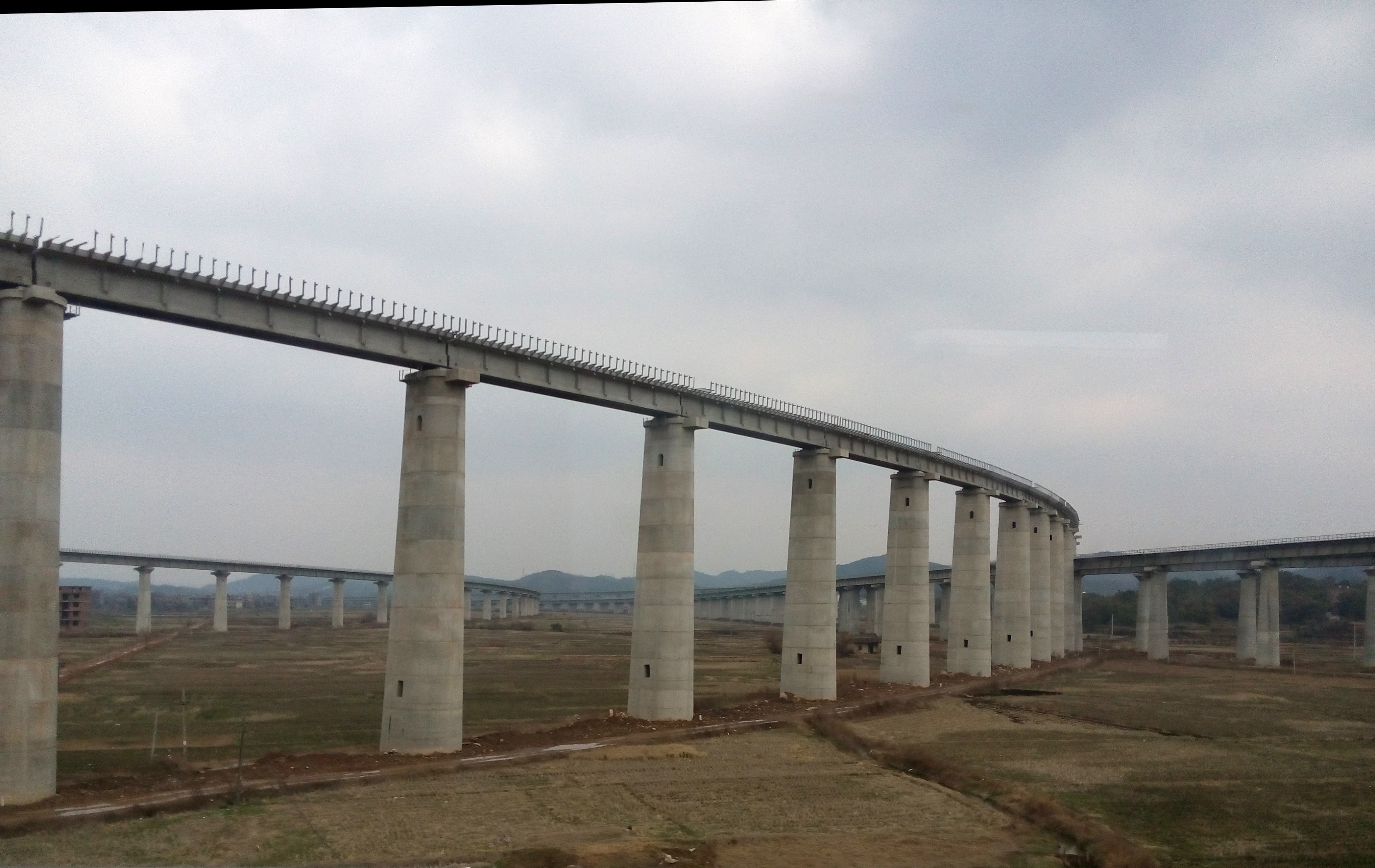 合福客运专线和杭长客运专线联络线